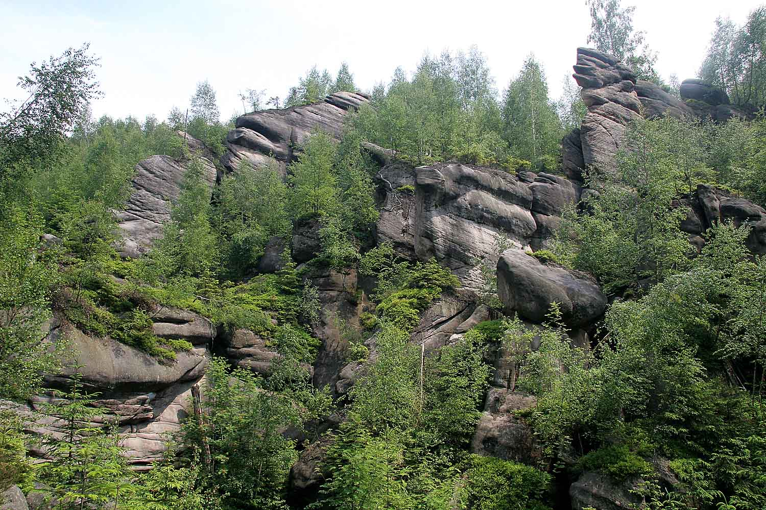 Písková rokle v NPR Broumovské stěny - střední část